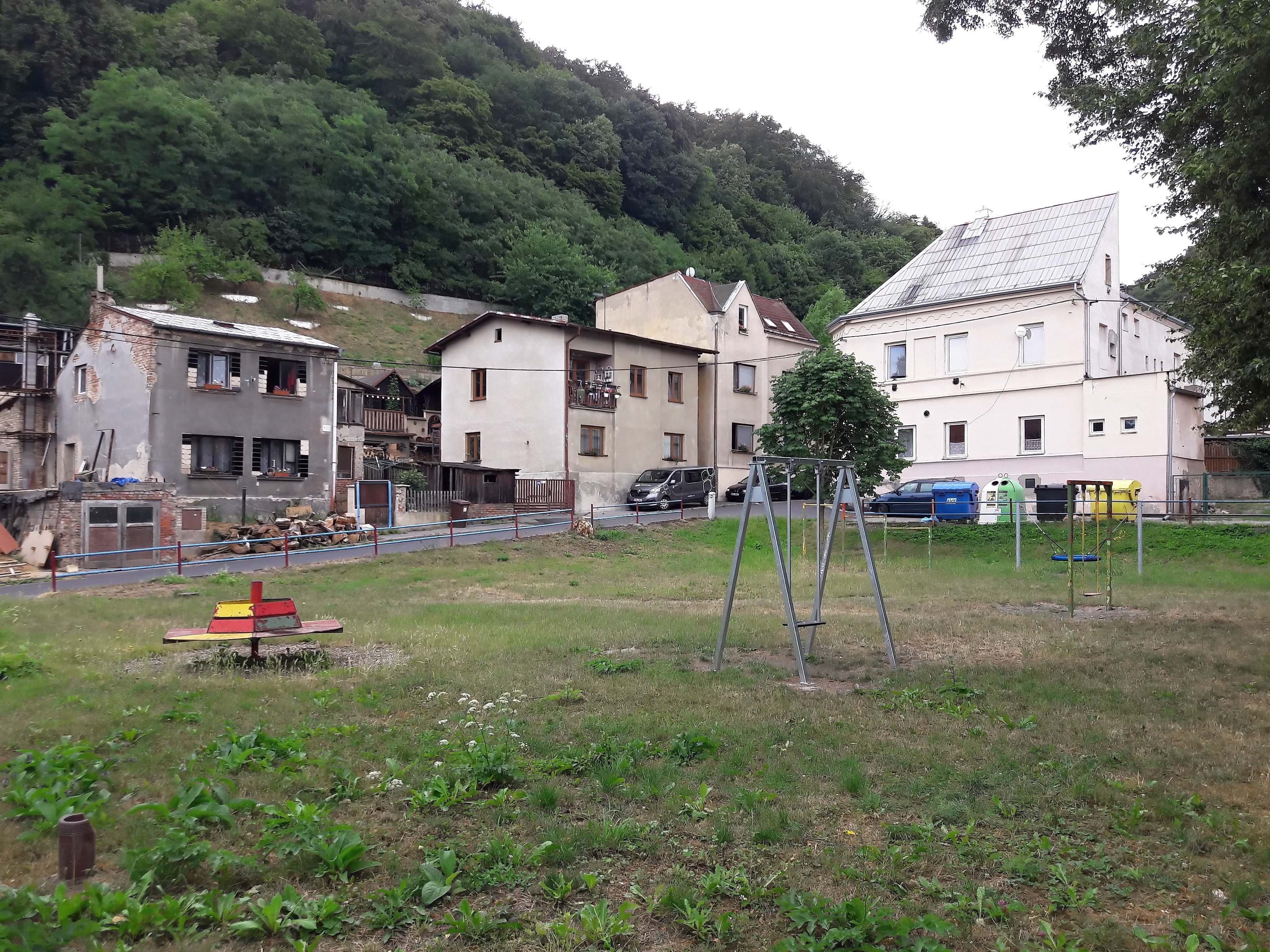 Hřiště v centru Olšinek v Ústí nad Labem